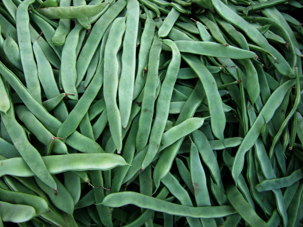 Fisolen